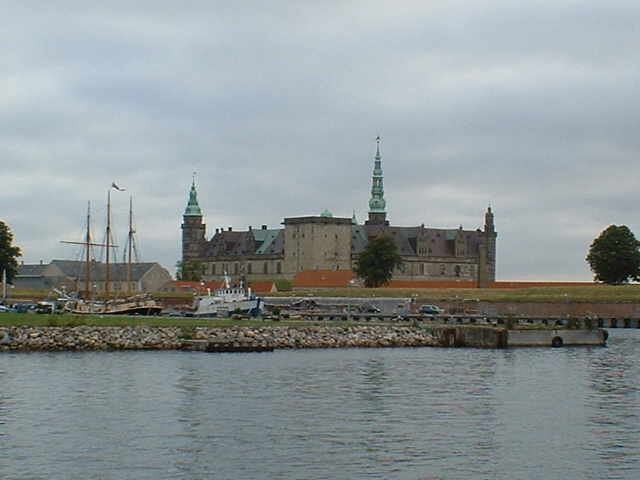 autor: Rybioko